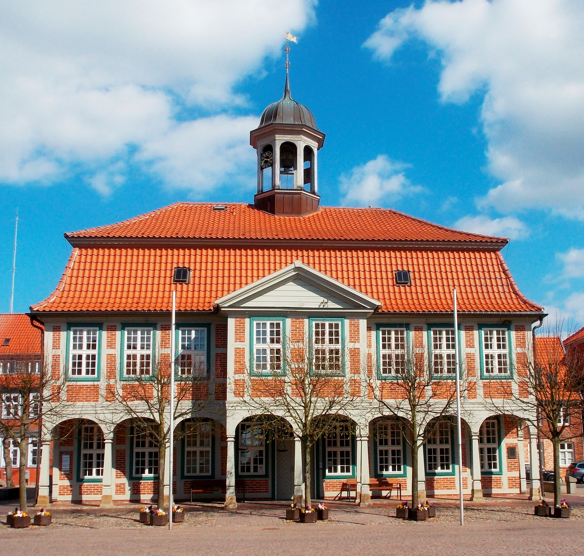 Vorderansicht Rathaus Boizenburg